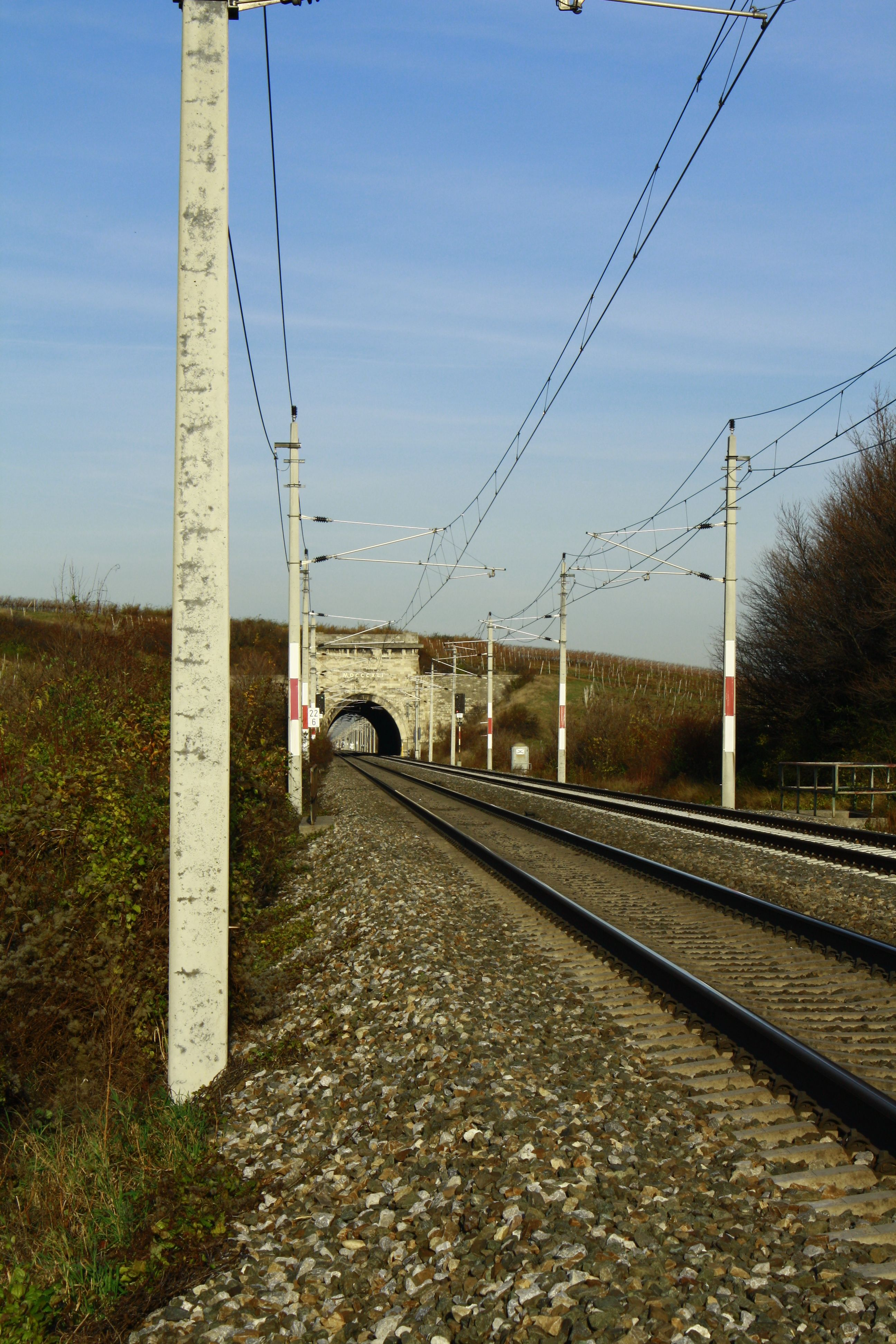 Busserltunnel auf der Südbahn in Niederösterreich, der erste Eisenbahntunnel Österreichs